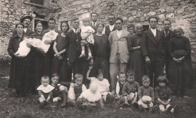 Foto di famiglia di fine 1800 a San Rocco (frazione di Marano di Valpolicella, provincia di Verona)